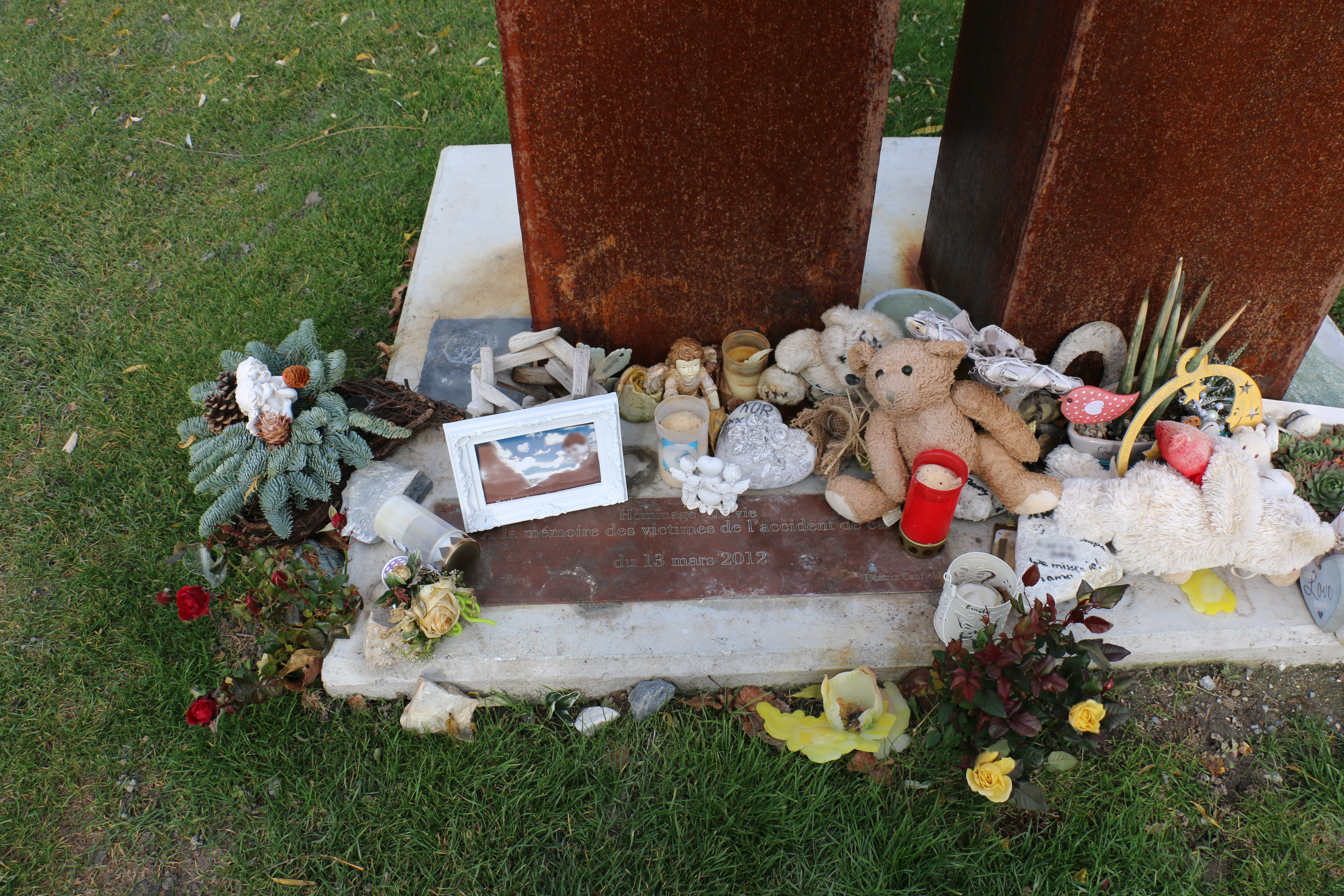 Un monument en mémoire des 28 victimes, dont 22 enfants, décédés dans l'accident de car de mars 2012 en Valais.